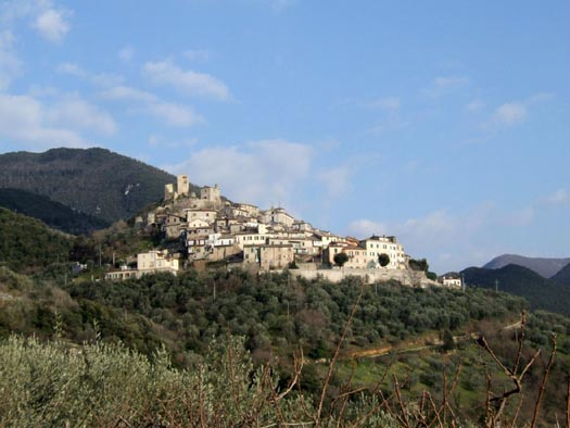 Roccantica RI